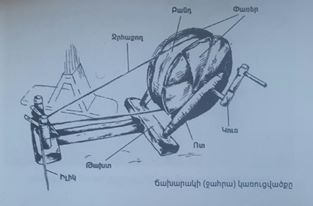 Ջահրա